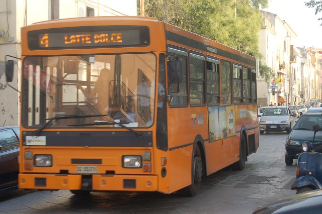 Vecchio autobus sulla linea 4